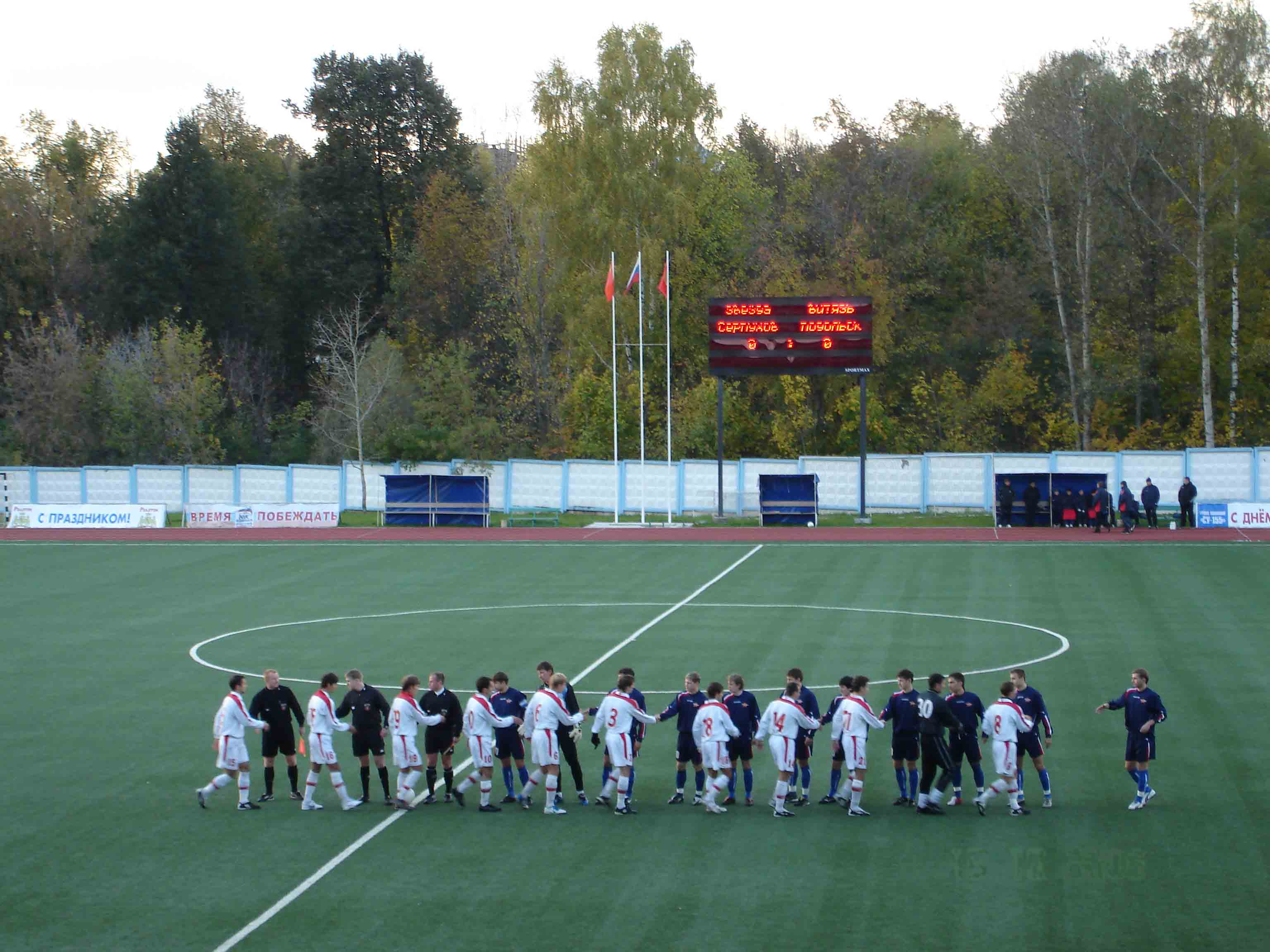 Звезда-ВитязьПеред началом матча Звезда-Витязь(Подольск)- 15/10/2006 Категория:Серпухов